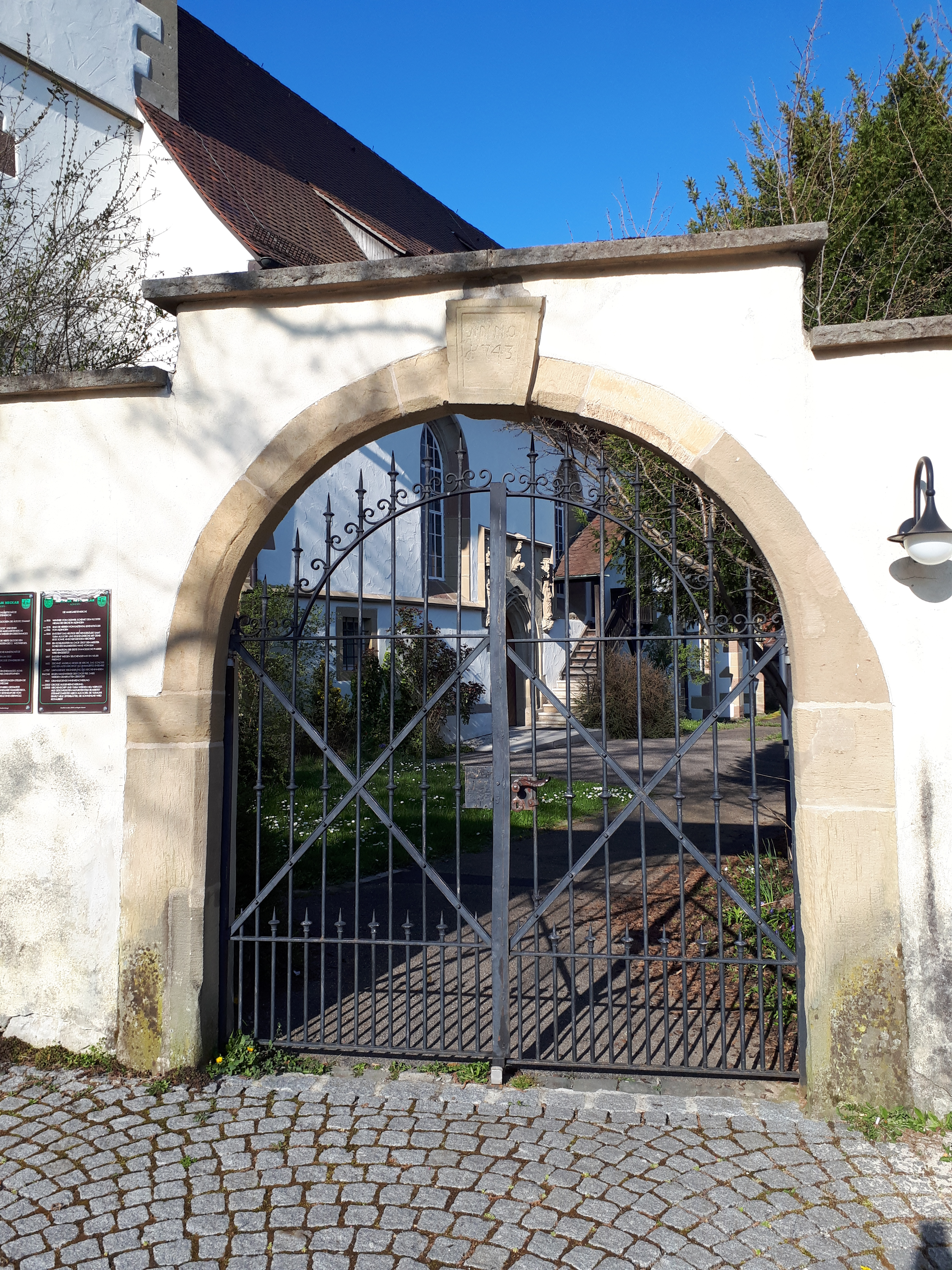 Westliches Zugangstor zum Kirchhof der Aldinger Margaretenkirche; hinter dem Tor ist das Hauptportal der Kirche